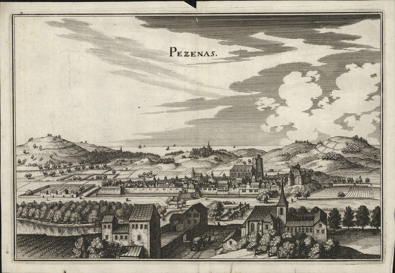 IdentificatieTitel: Pezenas Objectnummer: A 57455Objecttype: prent Huidige locatie: in depotOnderwerpen: Frankrijk stadsgezicht VervaardigingVervaardiger: Matthaeus Merian (prentmaker) Datering: 1650 – 1699 Materiaal: papier Verwerving en rechtenVerworven: aangetroffen VerzamelingWillet-Holthuysen, collectieLicentie: CC PDNaamsvermelding: Amsterdam MuseumDuurzaam webadres